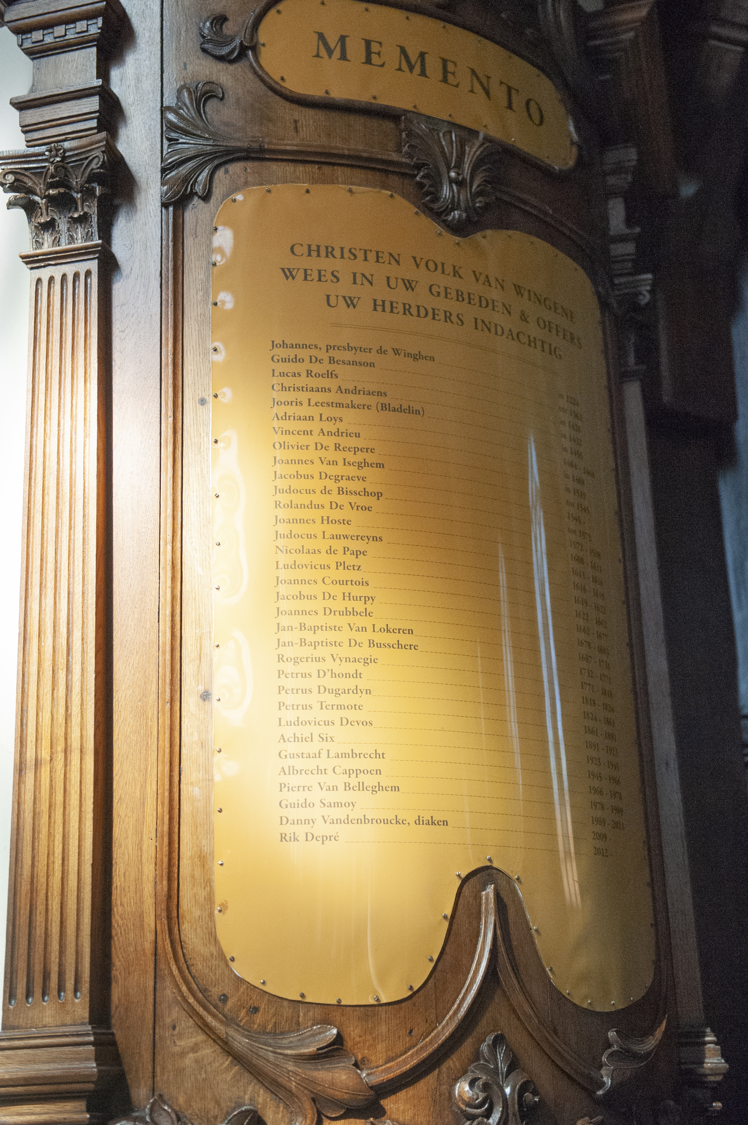 Gedenktafel